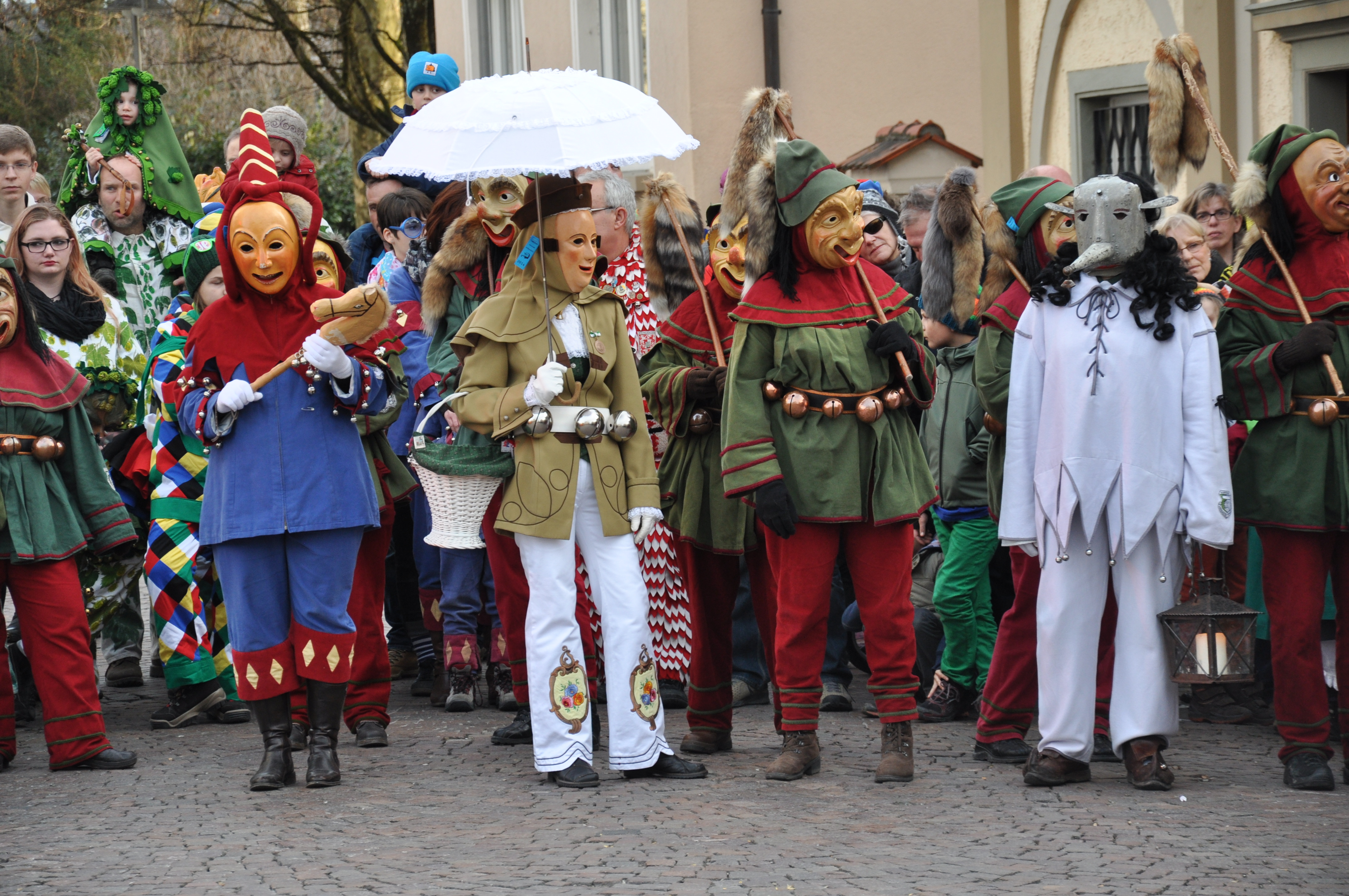 Narrenzunft Kisslegger Hudelmale e. V.; Narrenfiguren: Reitenderle, der Grundholde, Hudelmale, Schnarragagges Fotografiert beim Landschaftstreffen der Vereinigung Schwäbisch-Alemannischer Narrenzünfte (VSAN) 2014 in Tettnang; Brauchtumsvorführungen am Samstag, 15. Februar 2014